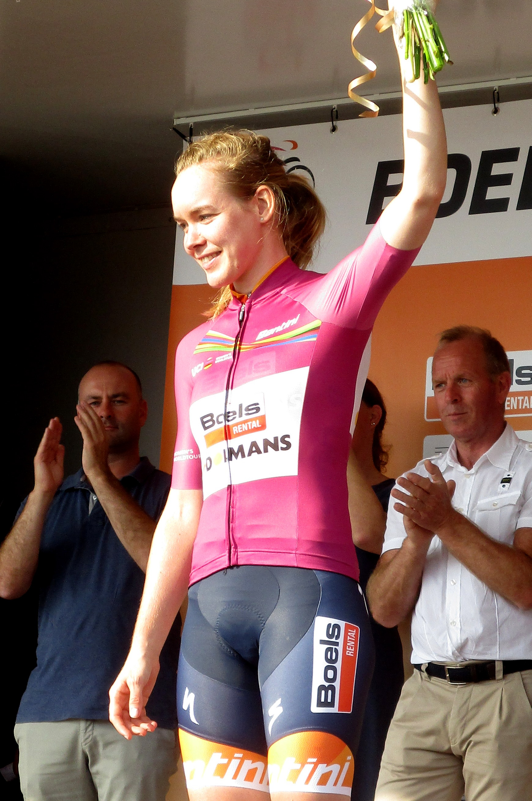 Huldiging van de winnaars van de Boels Ladies Tour 2017 op het Tom Dumoulin Bike Park in Sittard-Geleen.